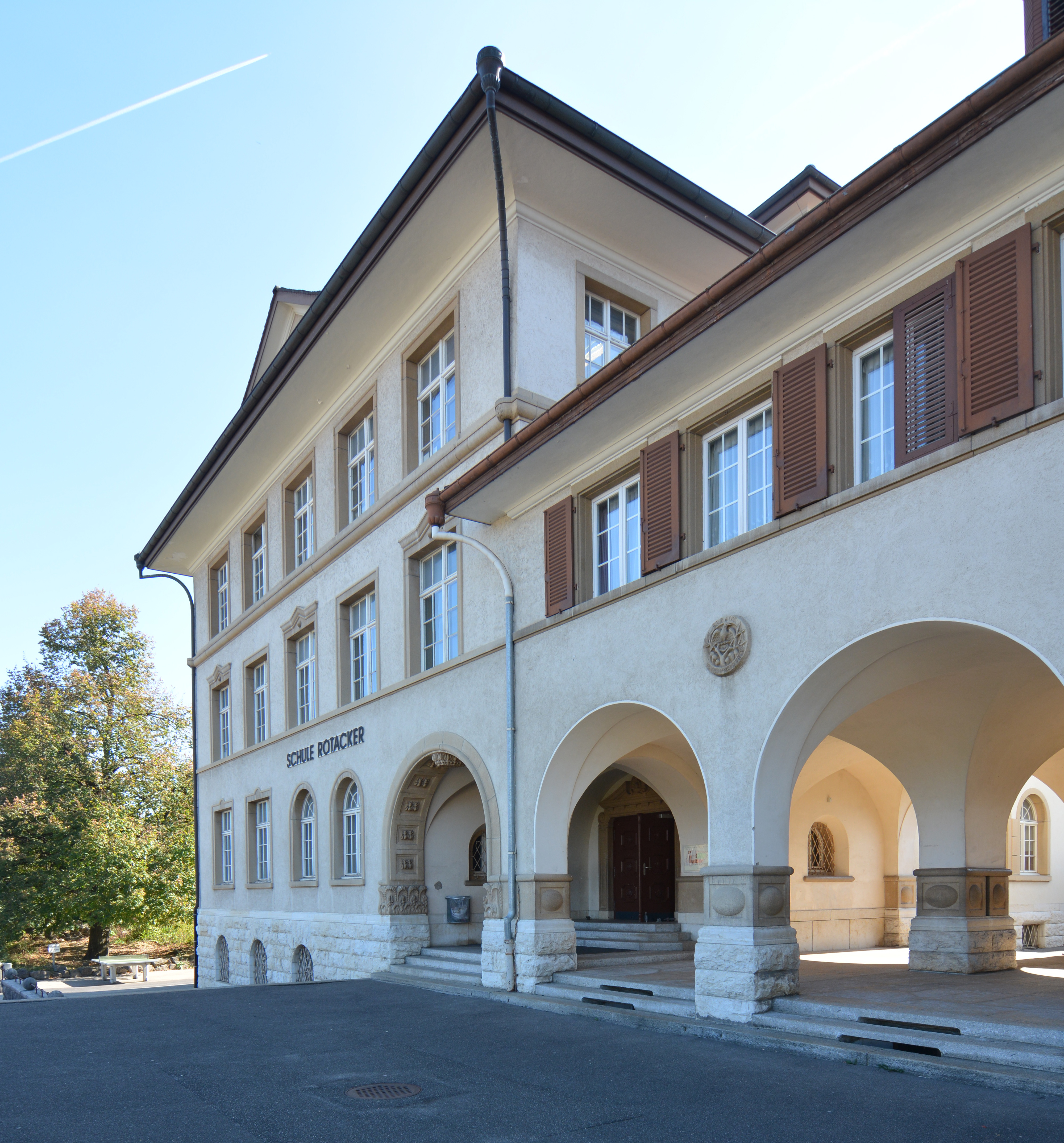 Erbaut 1917–1919, Architekt Wilhelm Brodtbeck.